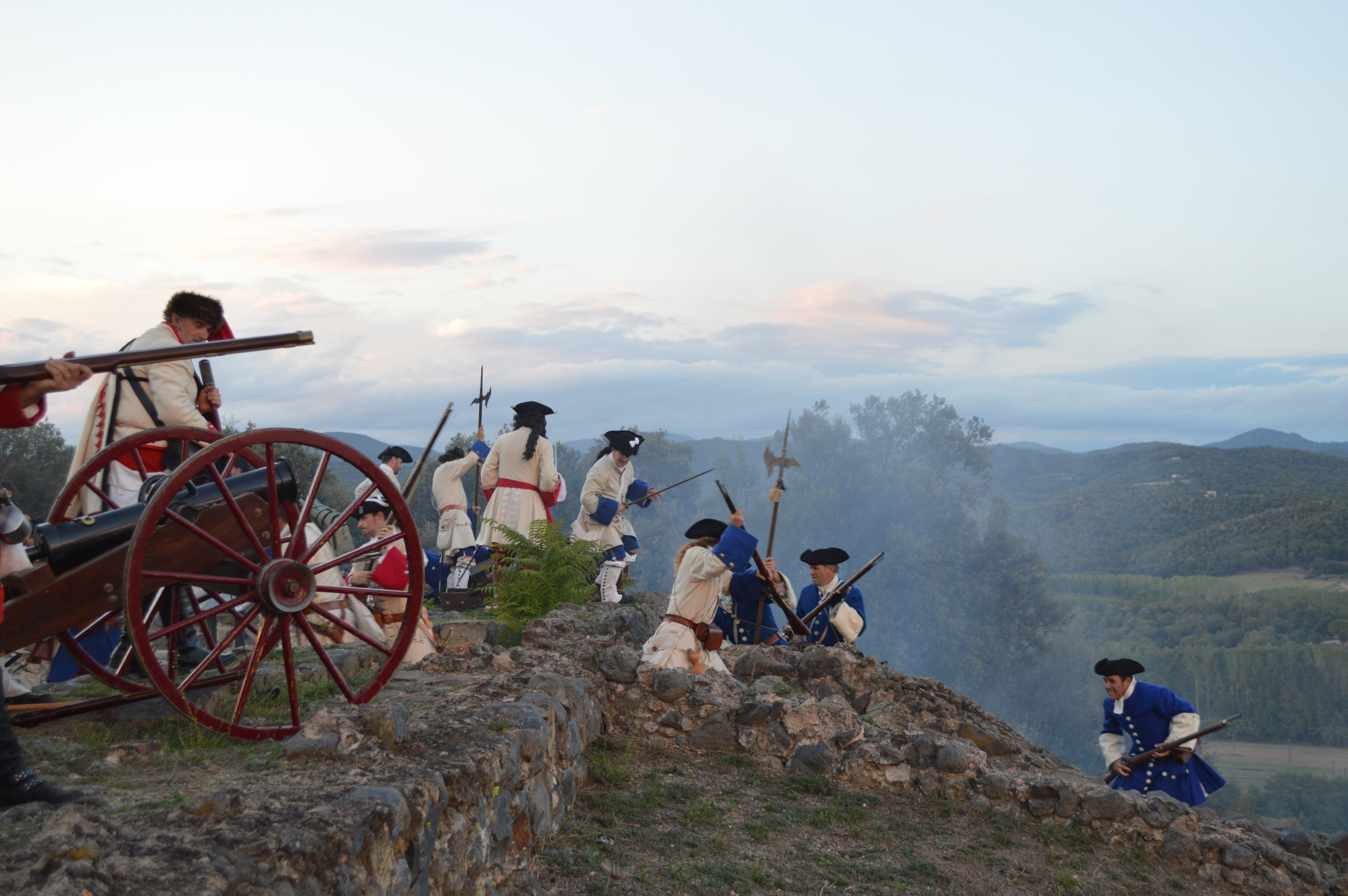 Miquelets de Girona – Regiment de Sant Narcís. El dissabte, faran la III recreació històrica Hostalric, Baluard Austriacista. La plaça d'Hostalric va ser una fortificació important de Carles III i l'Aliança. Un dels objectius de l'Expedició del Diputat Militar era evitar la seva caiguda a mans borbòniques. La missió va fracassar i el 17 d'agost es lliurava la plaça al borbònic Francesco Marulli; mentre l'expedició es dirigia cap a Arbúcies.